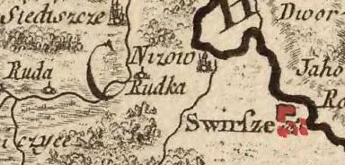 Hniszów (Nizow), powiat chełmski, na mapie Carte de la Pologne divisée par provinces et palatinats et subdivisée par districts construite par J. A. B. Rizzi Zannoni, Paryż 1772